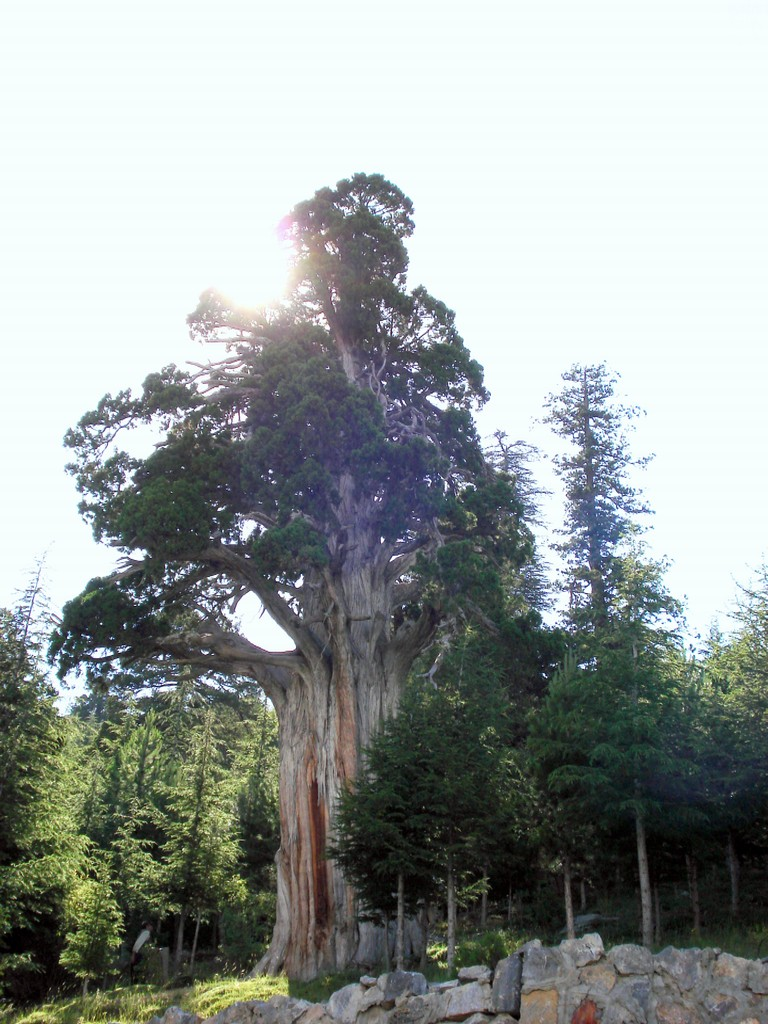 Ana Ardıç